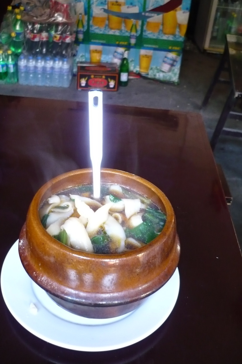 中文（中国大陆）: 孔府熏豆腐